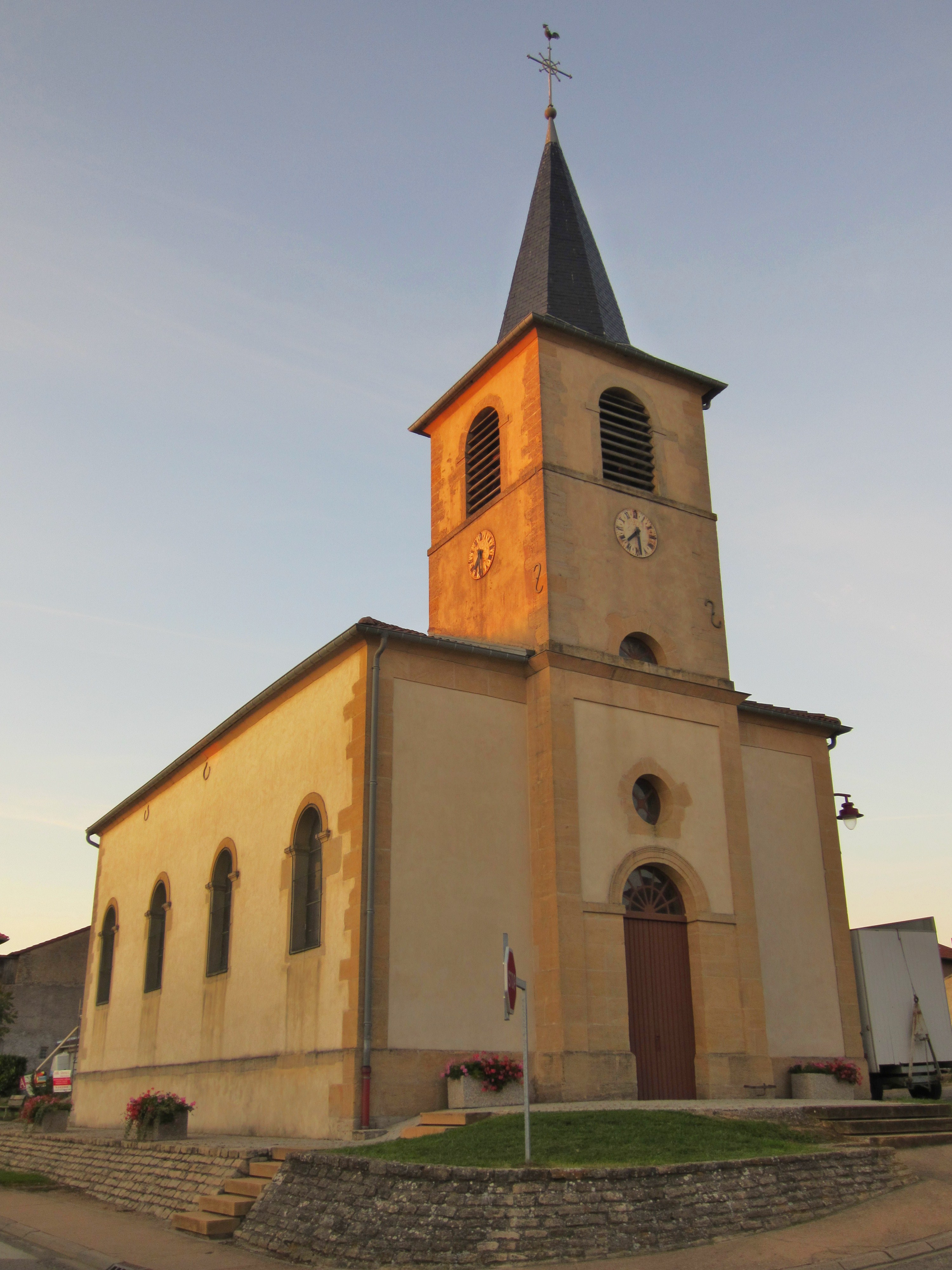 Description eglise Boncourt eglise Boncourt